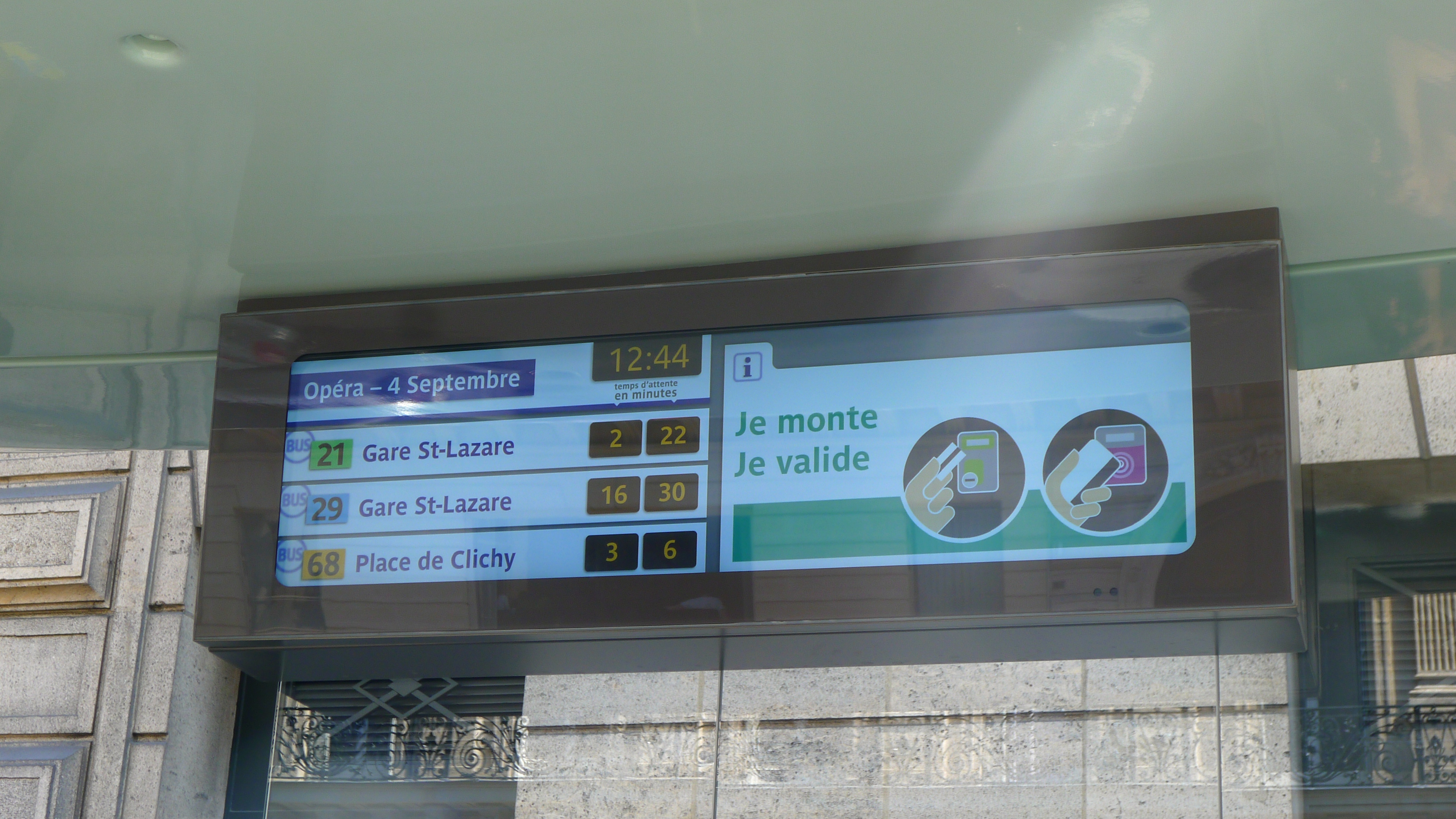 Panneau SIEL en couleurs des nouveaux abribus parisiens à l'arrêt Opéra.